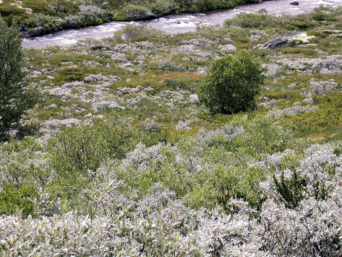 Dovrefjell, Norge. Jeg har rettet billedet - fjernet Moskusokserne - håber det er OK og ikke alt for kluntet udført. Der er ingen tvivl om at man kan se redigeringen hvis man kigger efter den (særligt når man har det oprindelige billede).